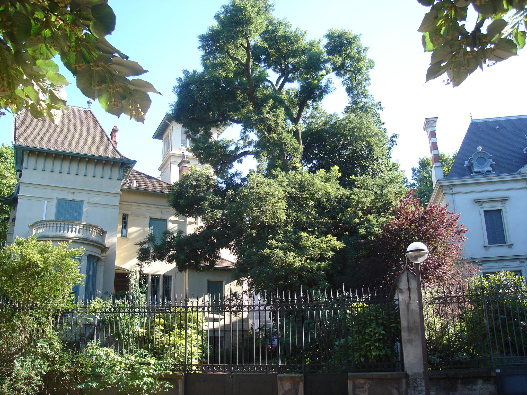 Demeures cossues longeant le Boulevard des Belges côté parc, Lyon